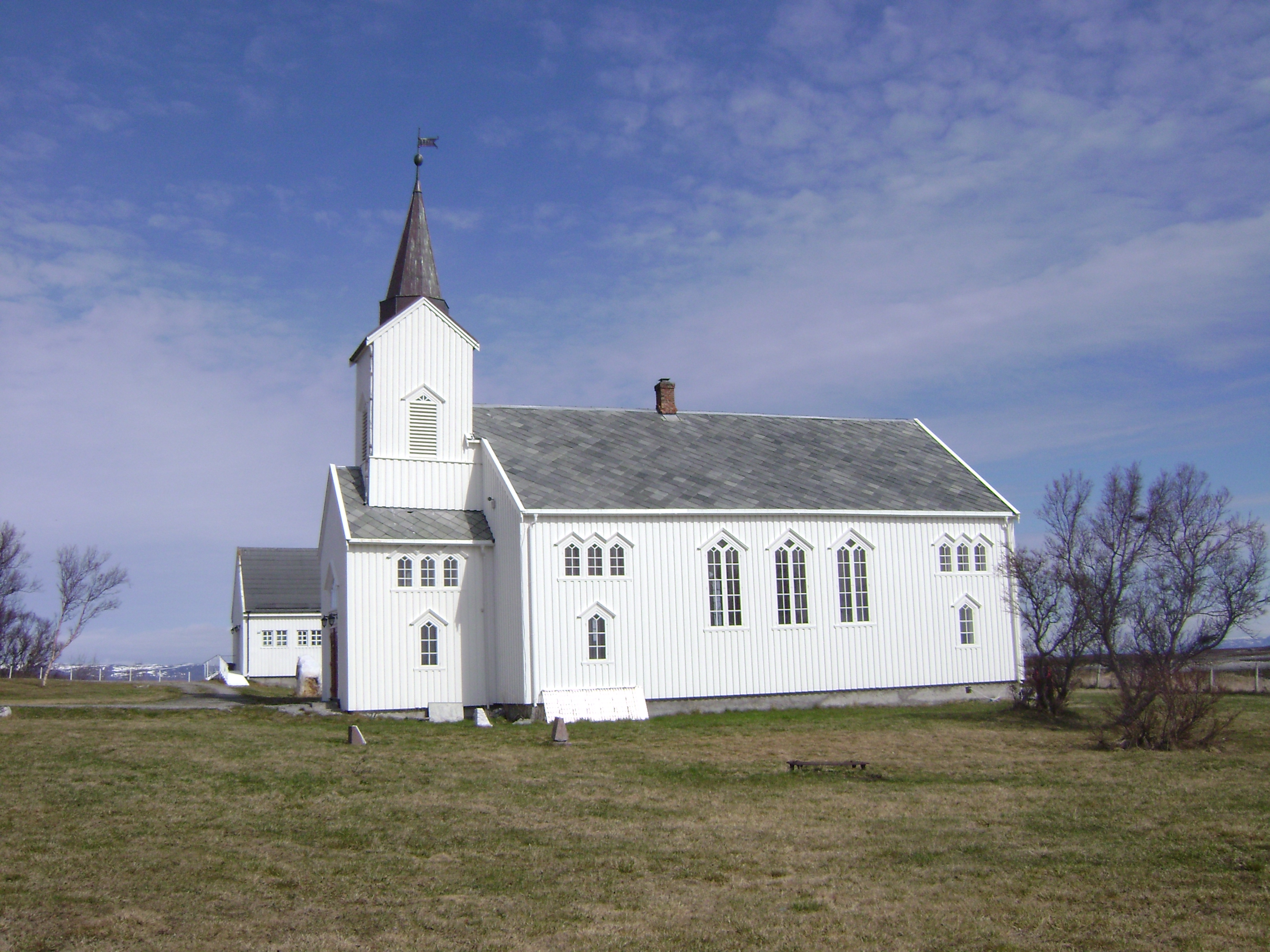 Kistrand kirke i Porsanger kommune, Finnmark. En av 5 kirker som overlevde nedbrenningen av Finnmark høsten 1944.